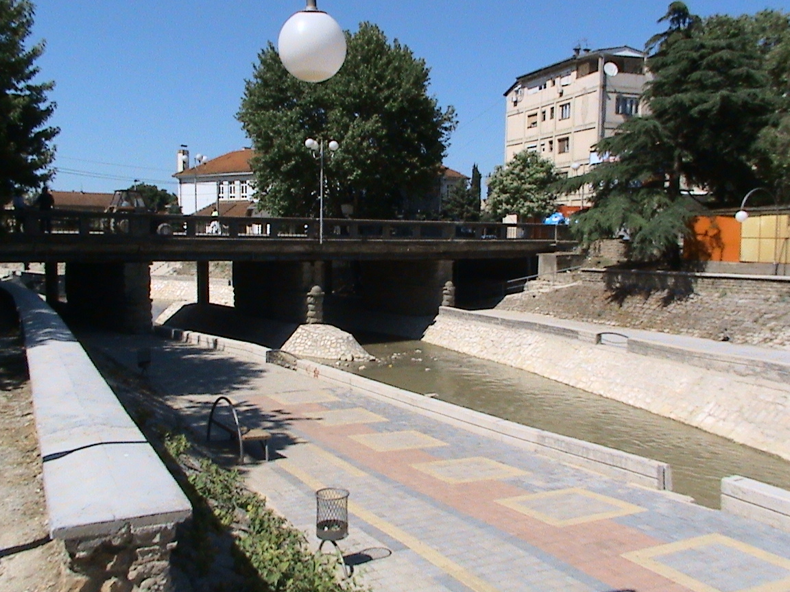 Most na reci Luda Mara u Kavadarcima u Makedoniji